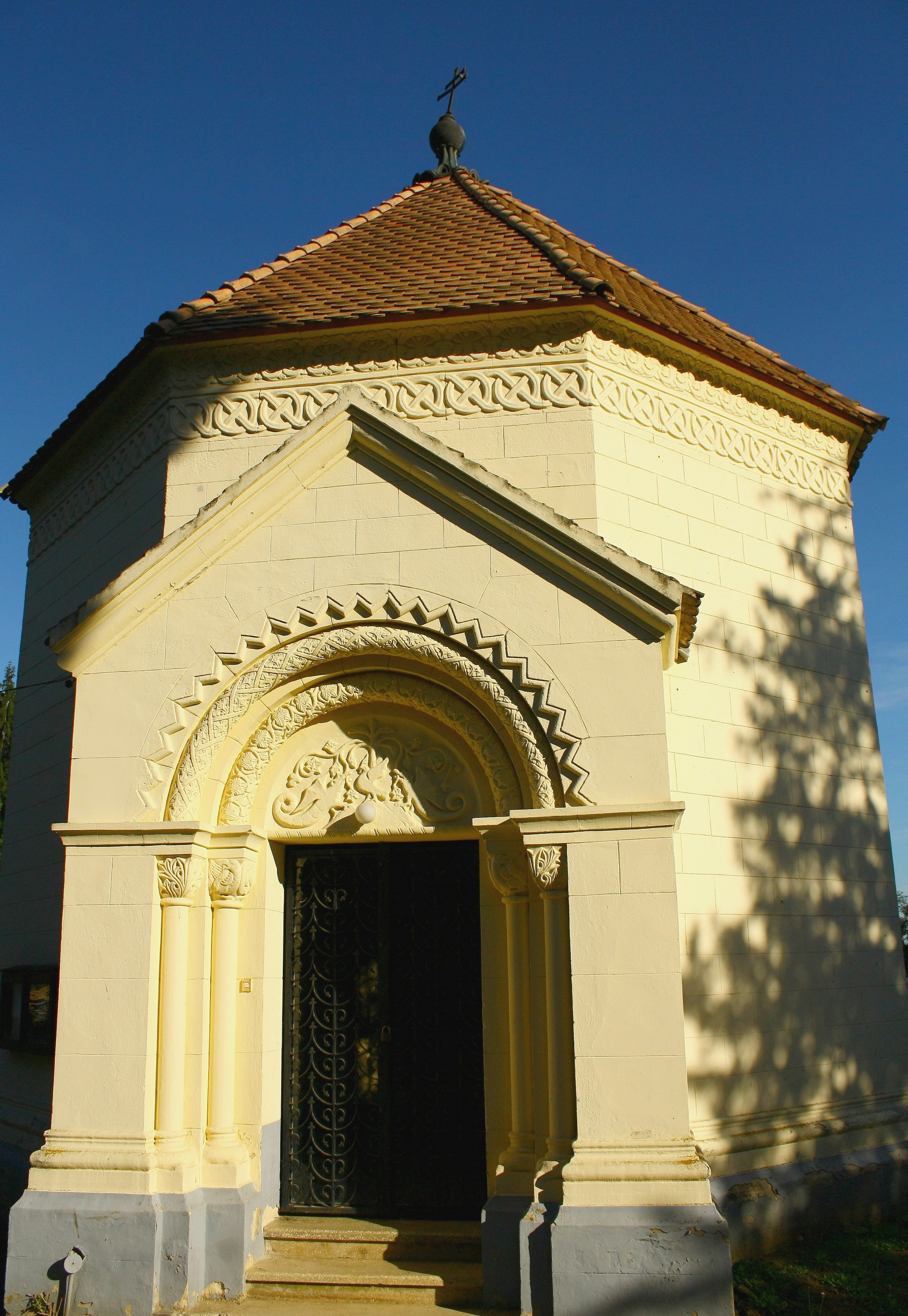 Temetőkápolna (Barcs, Somogytarnócai temető) This is a photo of a monument in Hungary. Identifier: 7809